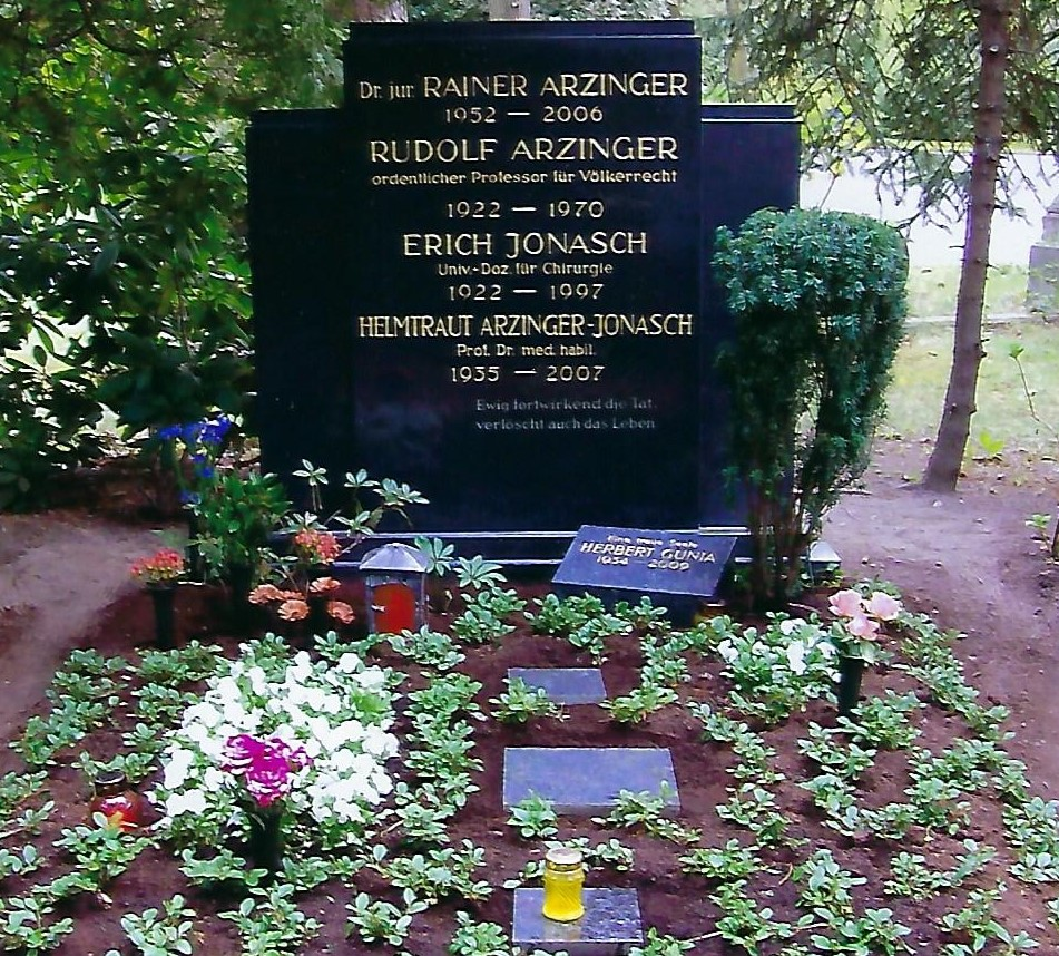 Grab von Helmtraut Arzinger-Jonasch, ihrem Stiefsohn Dr. iur. Rainer Arzinger, ihrem zweiten Ehemann Prof. Dr. iur. Rudolf Arzinger und dem dritten Ehemann, dem österreichischen Chirurgen Erich Jonasch. Unten rechts ist die Gedenktafel für ihren ersten Ehemann Herbert Gunia.